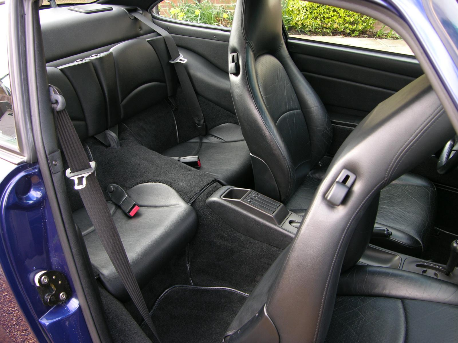 Porsche 911 Carrera 2